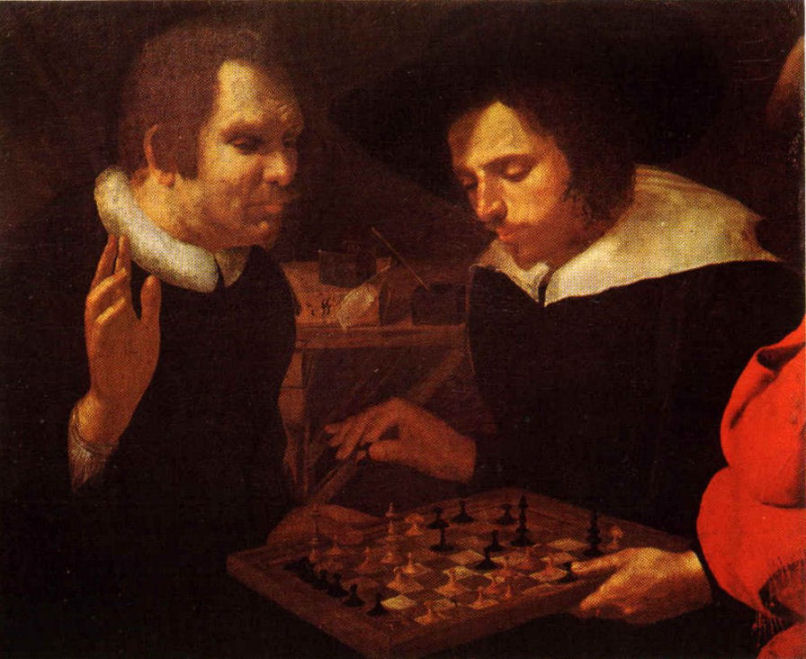 “Les joueurs d'échecs”, peinture attribuée à Carel van Mander